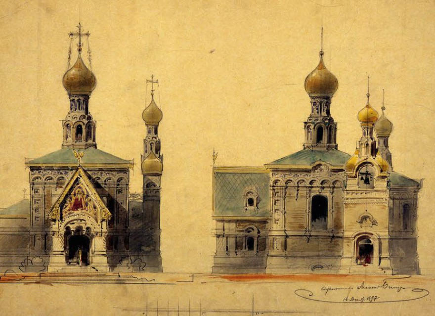 Entwurfsskizze der Außenfassade der Russischen Kapelle in Darmstadt von Leon Benois.